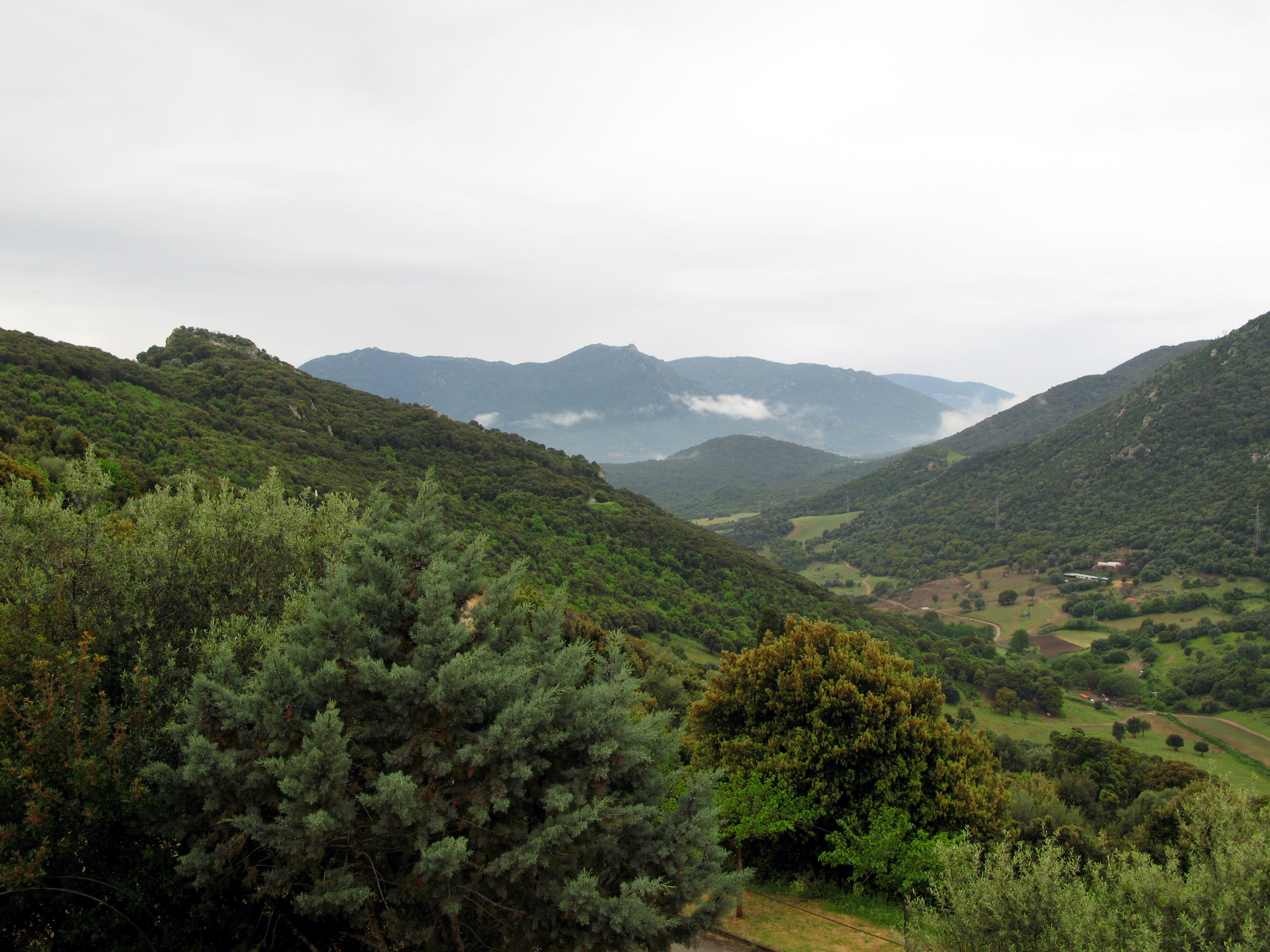 Arbellara (Corse-du-Sud, France) Nuages remontant la vallée par une matinée de printemps. Le mince filet vert (commençant sur le bord droit de la photo), dessinant la ligne la plus basse entre les 2 versants, est en fait, non un vrai petit ruisseau, mais un petit sillon par lequel s'évacuent les eaux usées du village à droite (plus en hauteur), celui-ci ne disposant pas de tout-à-l'égout ou de station d'épuration.